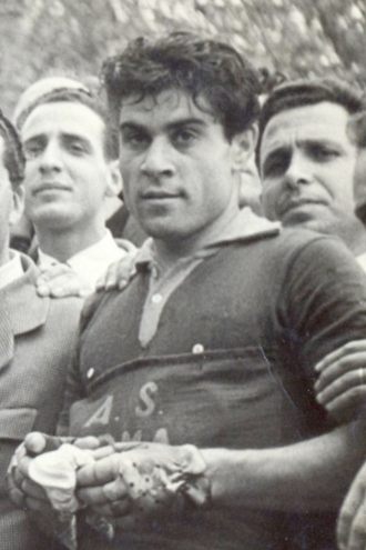 Coppa Italia 1952: Luciano Ciancola